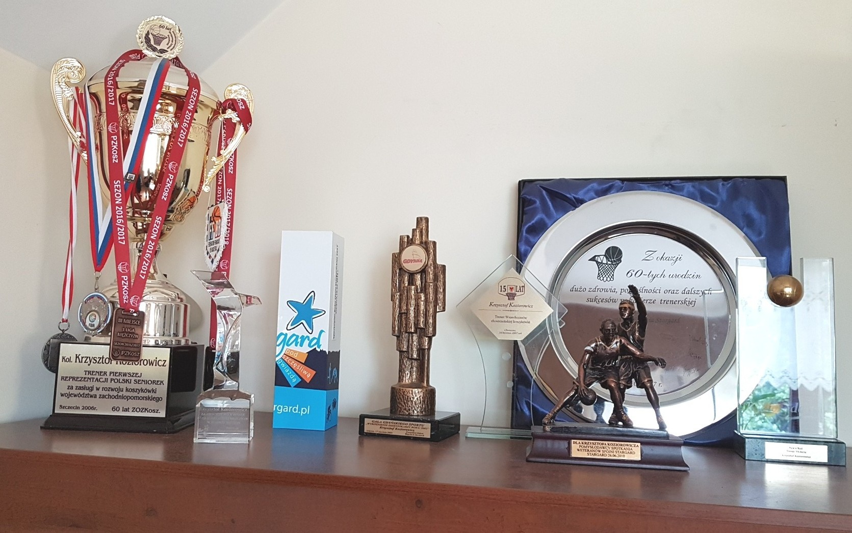 Pamiątki Krzysztofa Koziorowicza (2018)